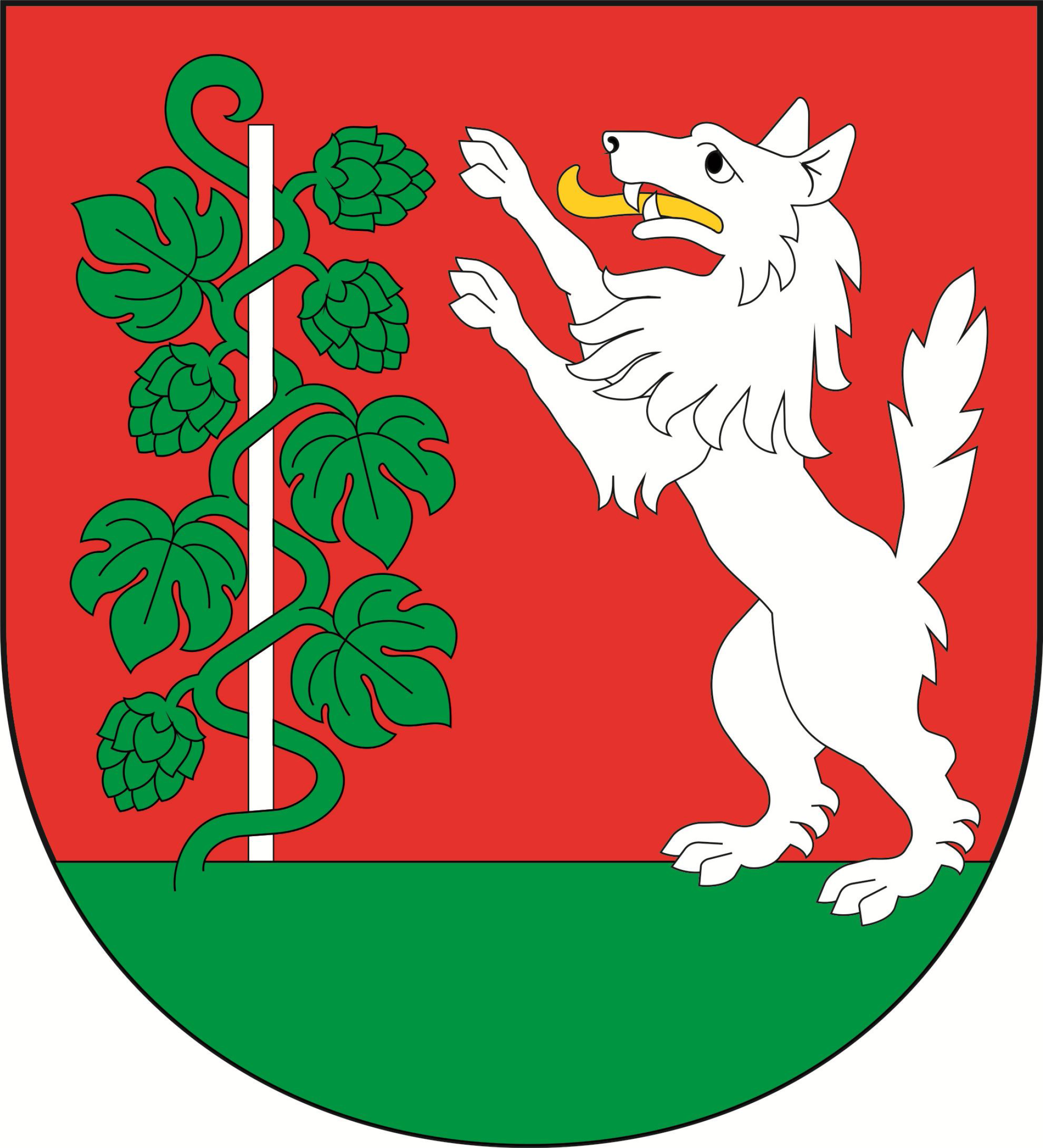 Herb gminy Wilków w województwie lubelskim.